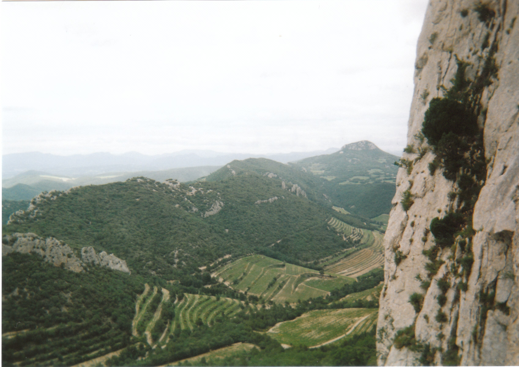 vue sur les vignobles et la crête de Saint-Amand